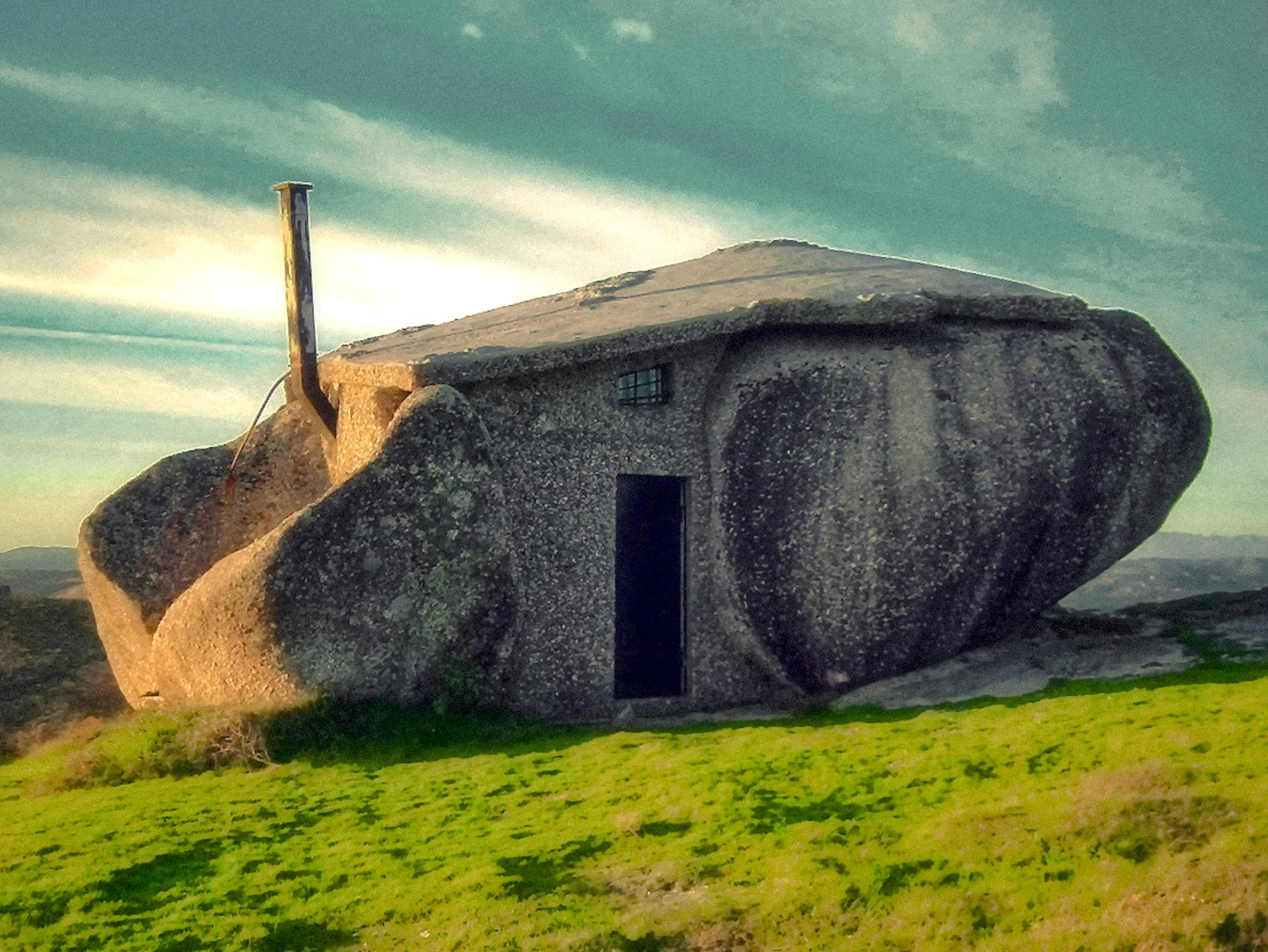 Nas montanhas de Fafe, Portugal.